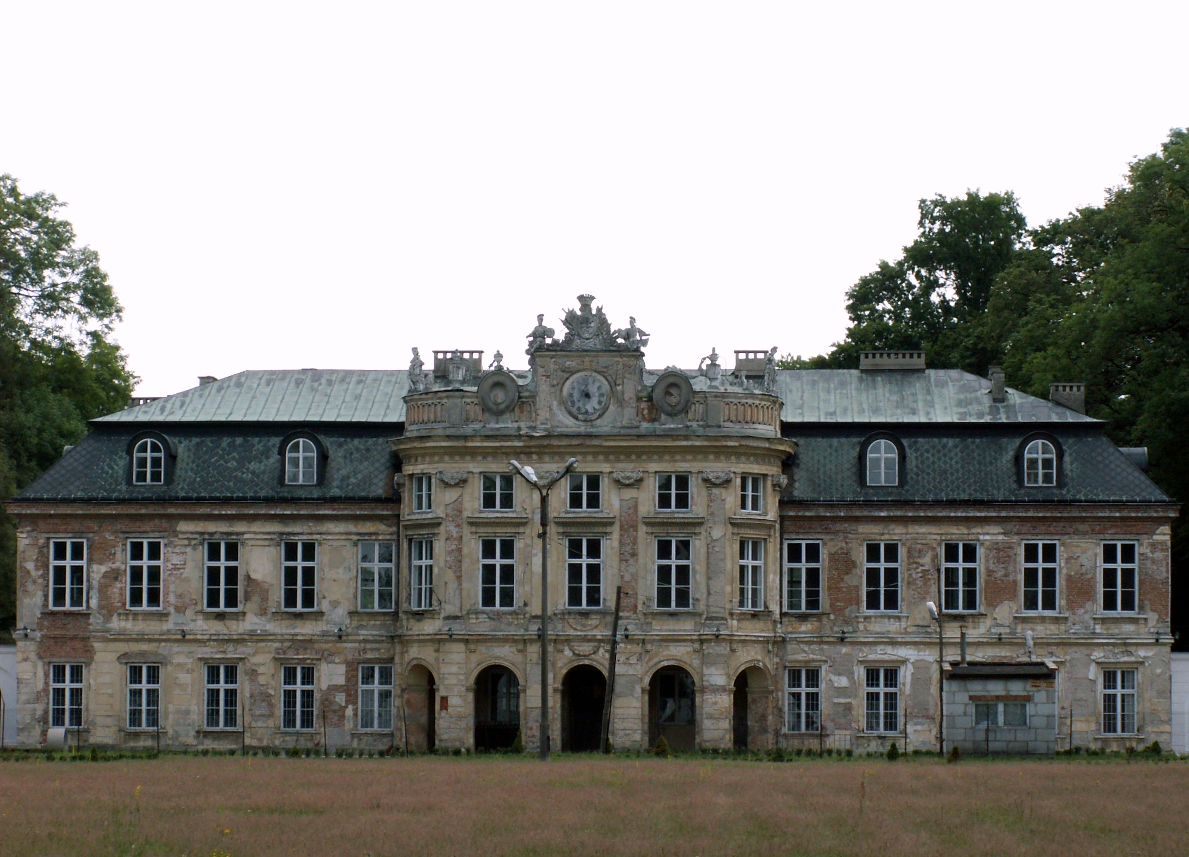 Pałac w Szczekocinach